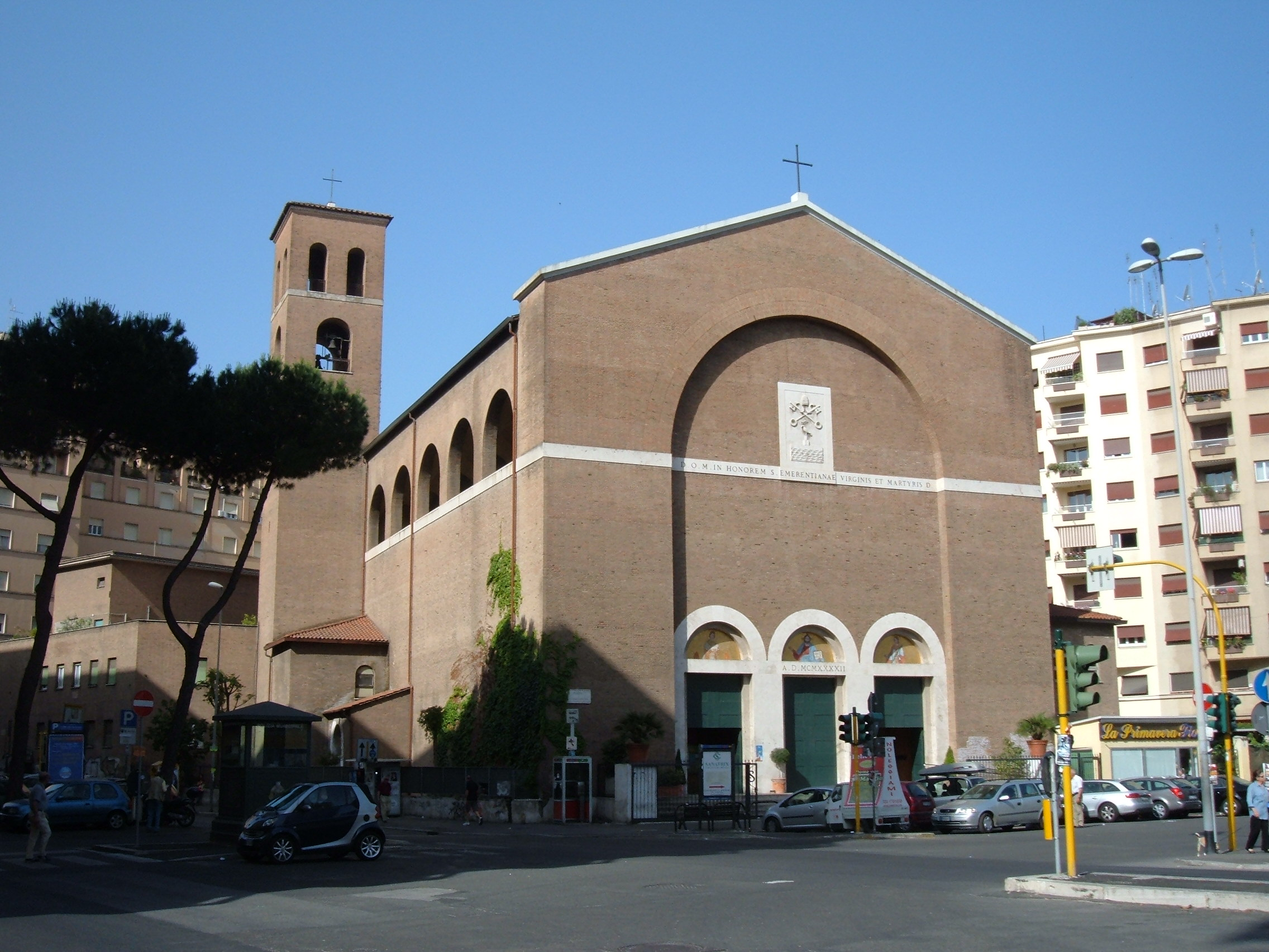 Chiesa di Santa Emerenziana, a Roma, nel quartiere Trieste.